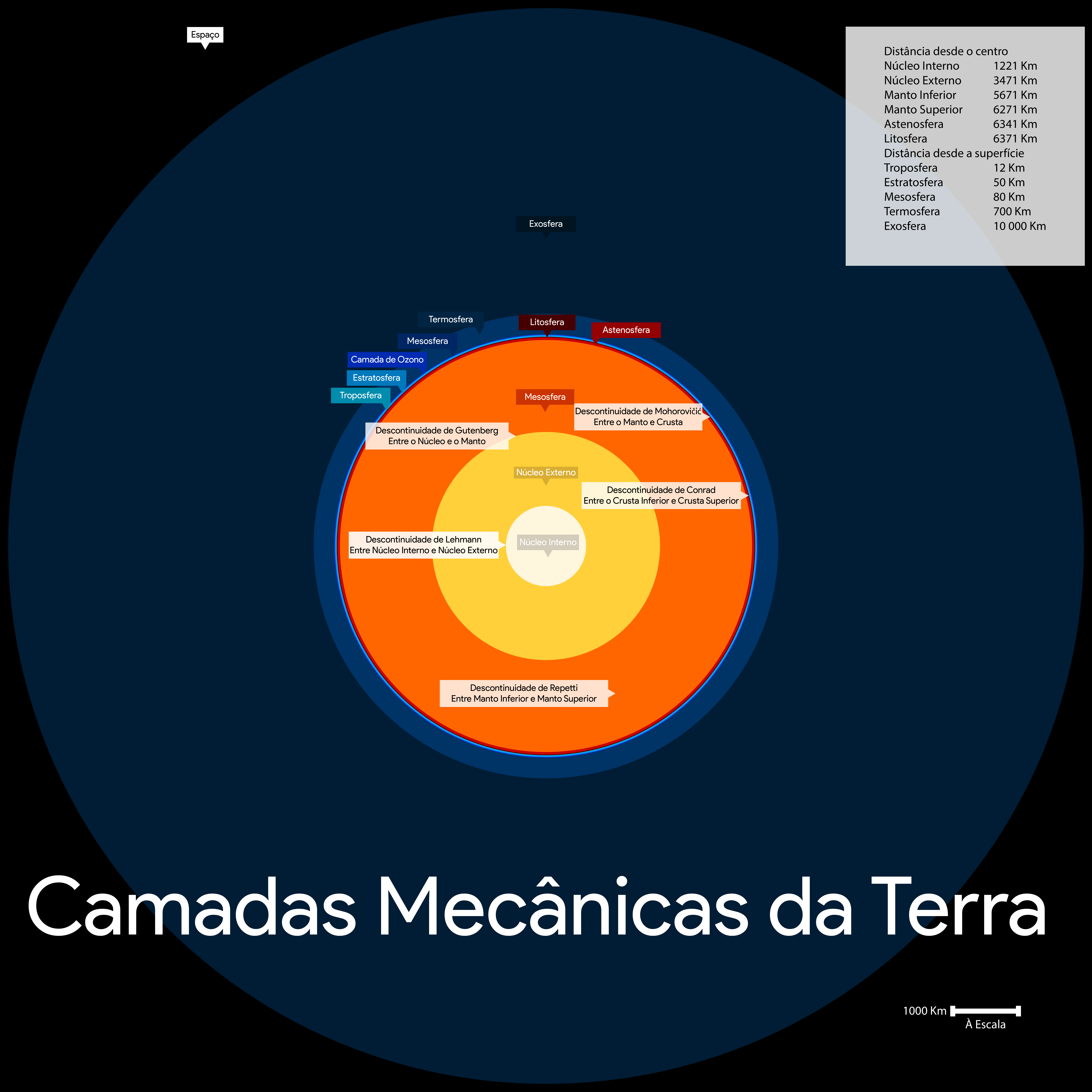 Camadas Mecânicas da Terra à escala e os seus tamanhos